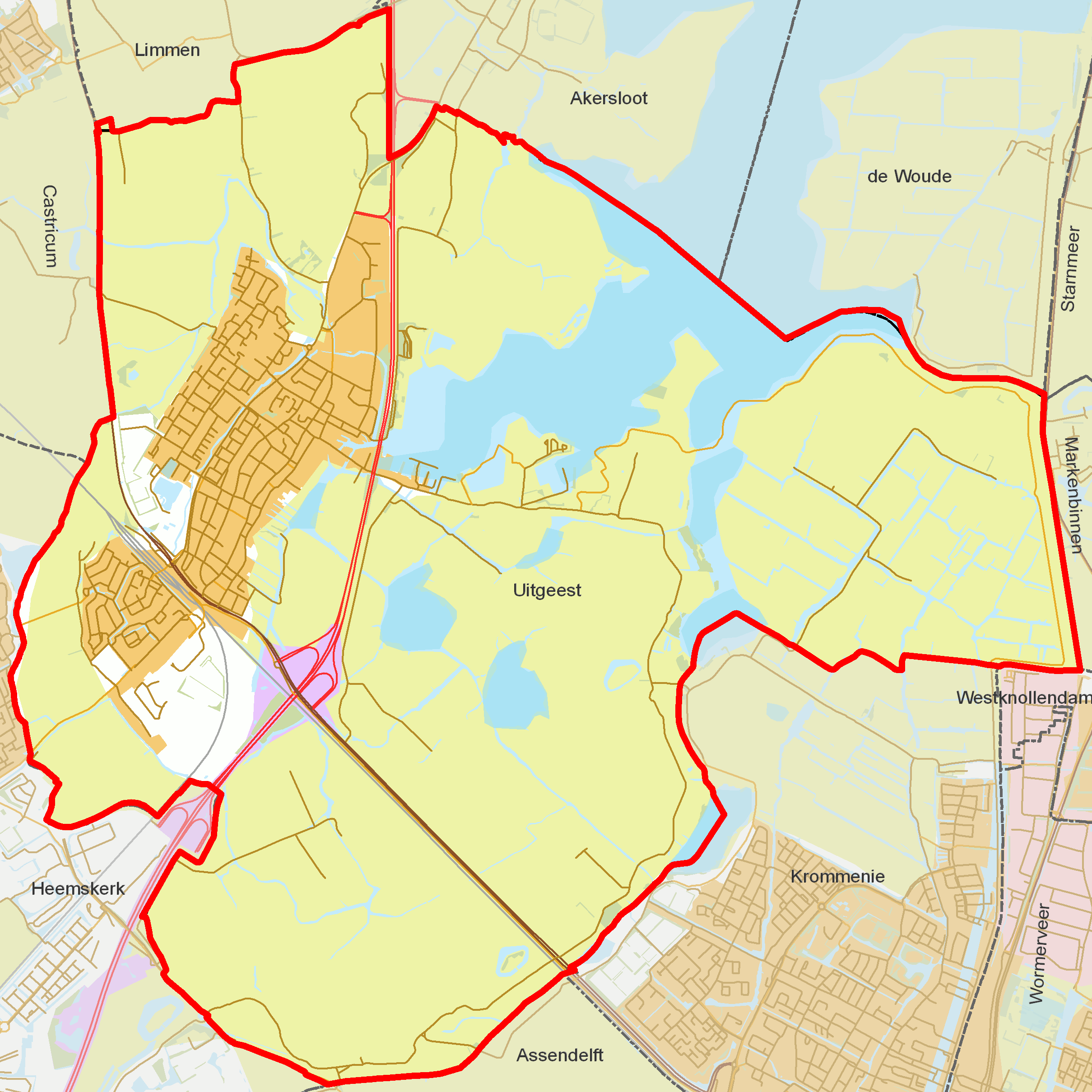 BAG woonplaatsen - Gemeente Uitgeest.png